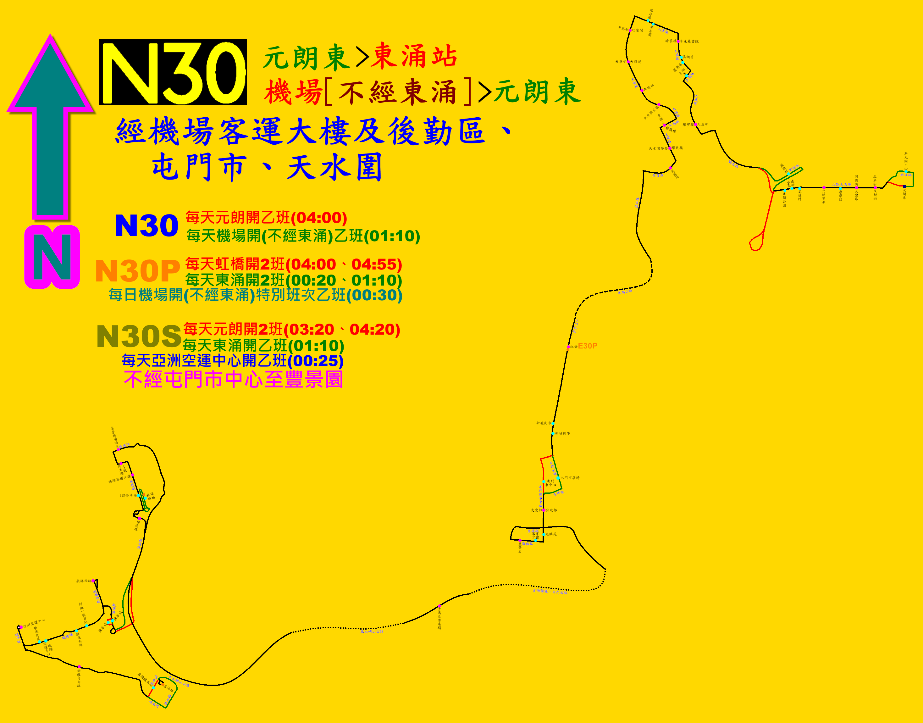 中文（香港）: 龍運巴士N30線及N30P線的走線圖